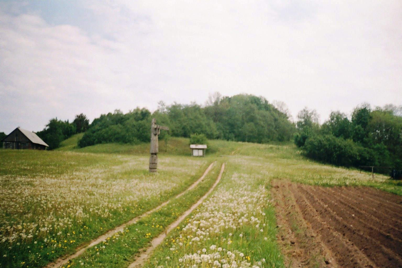 Foto: Xportas